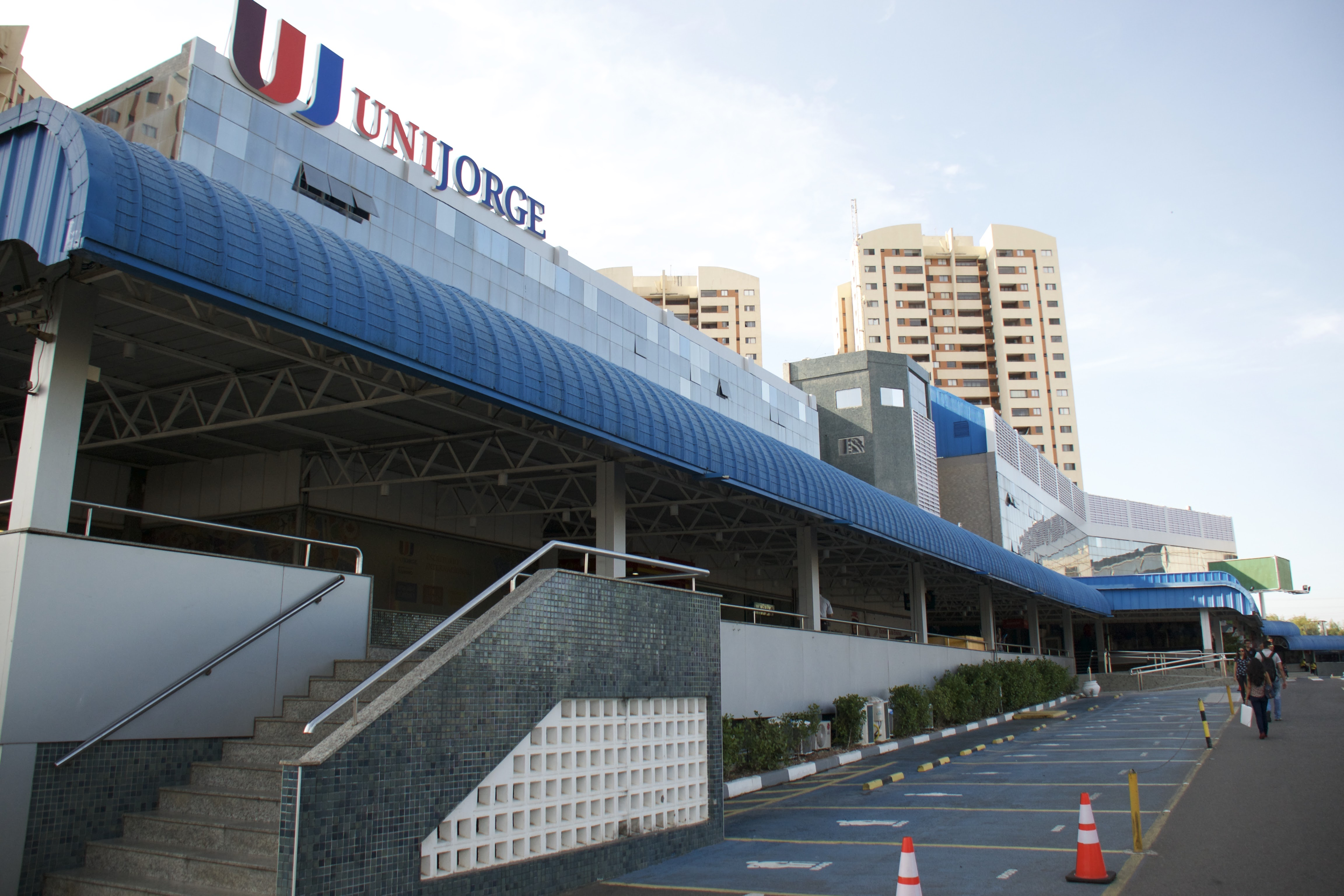 fachada do campus Paralela